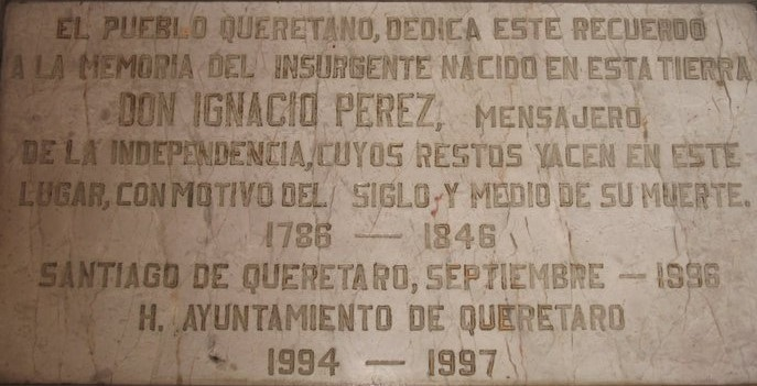 Placa colocada sobre los restos del héroe nacional Ignacio Pérez Álvarez, ubicada en el Panteón de los Queretanos Ilustres.